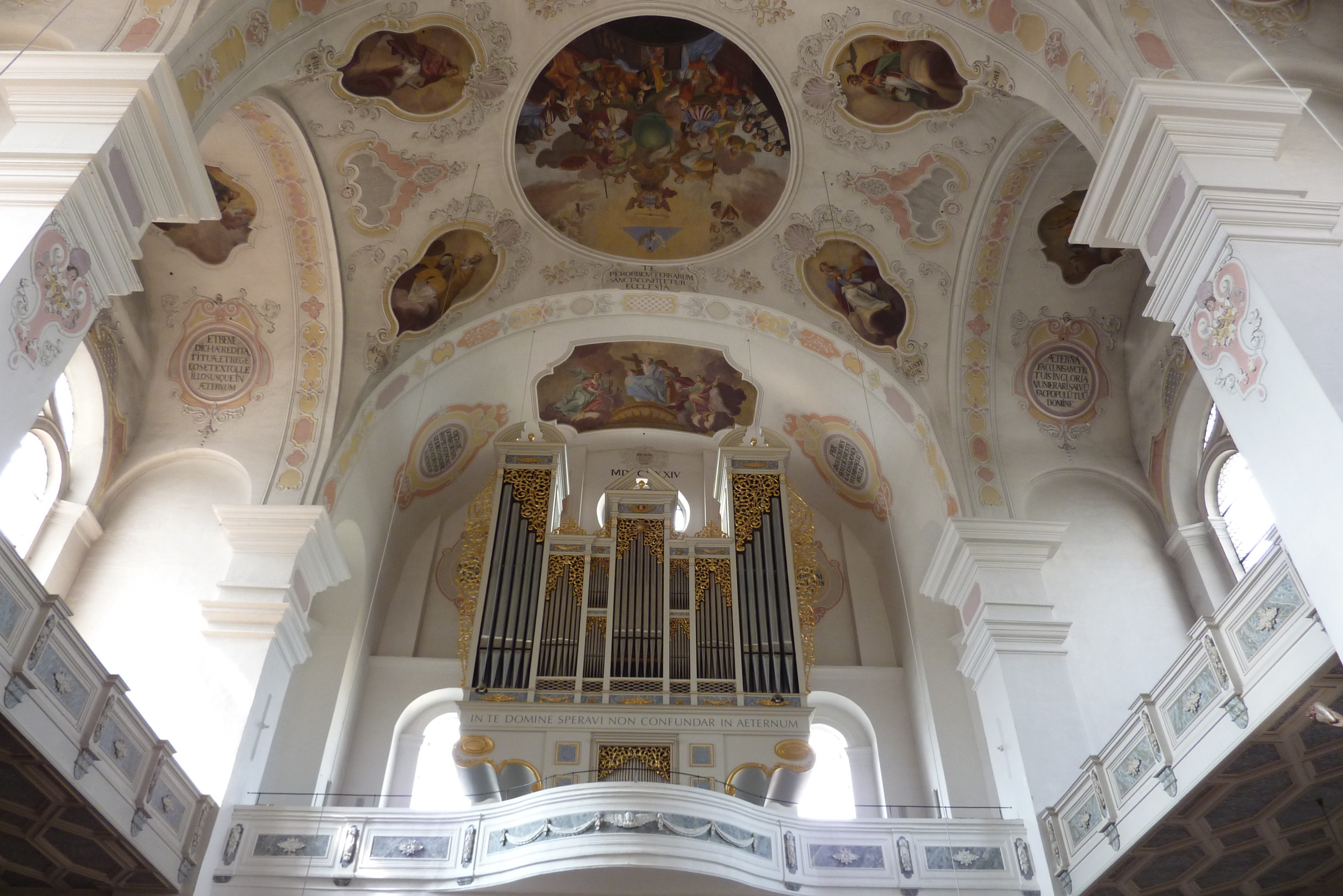 Katholische Pfarrkirche Basilika St. Peter (Dillingen) in Dillingen an der Donau, Orgel